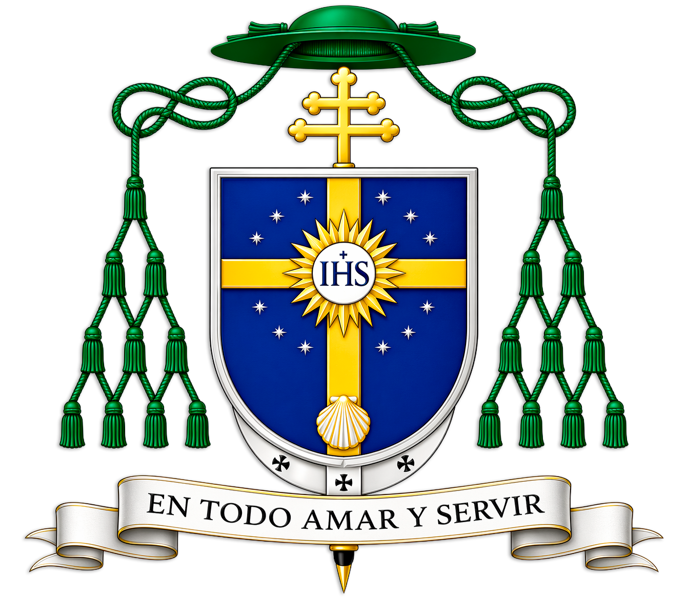 Escudo episcopal del III Arzobispo de Cumaná